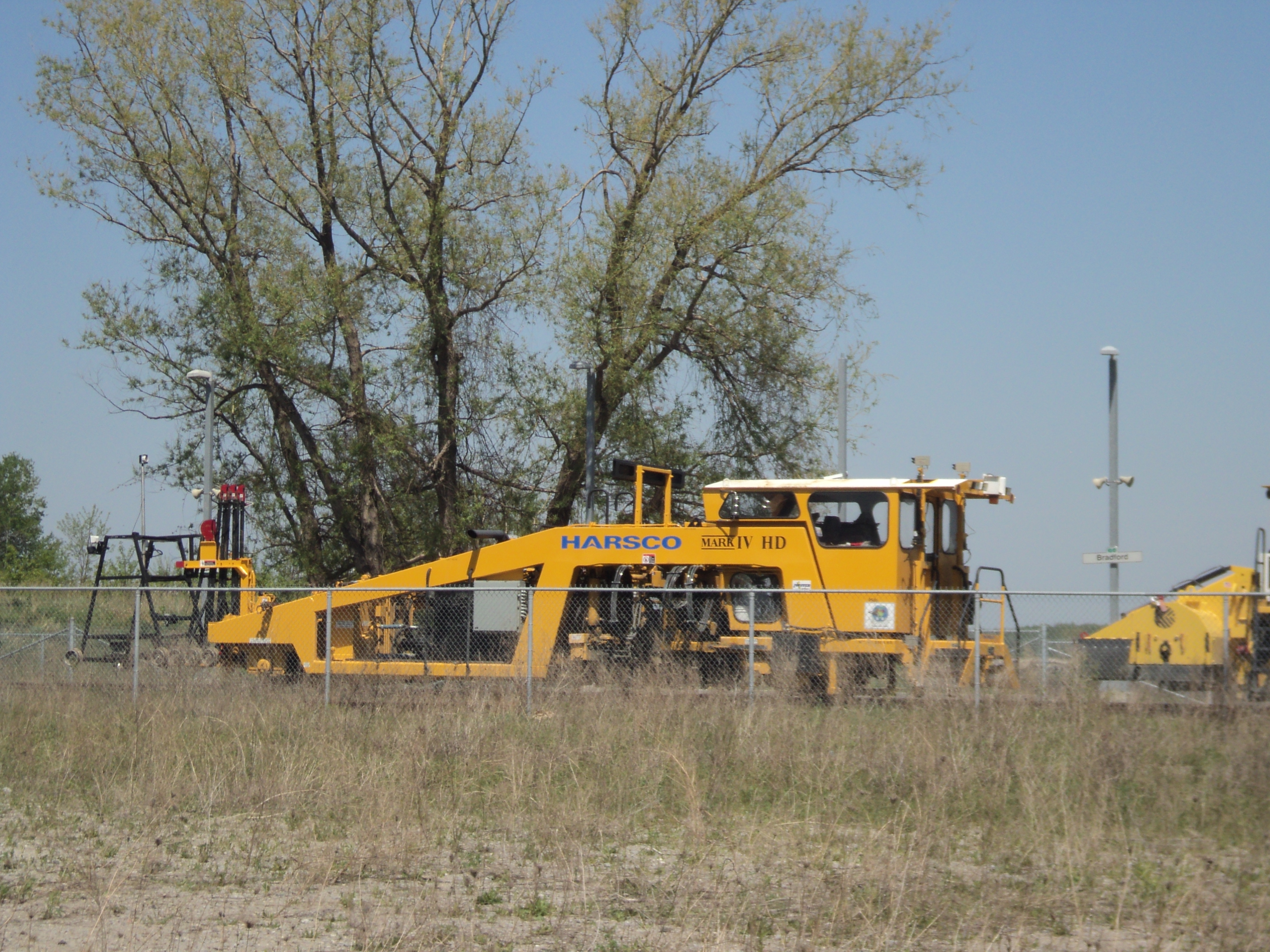 Harsco equipment